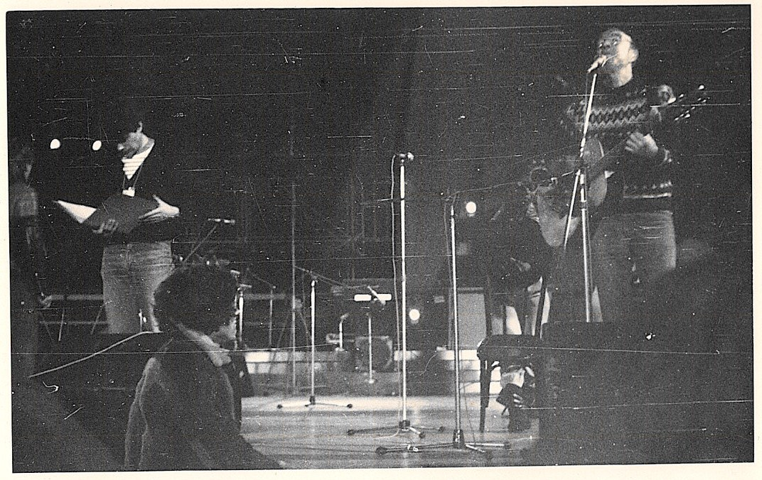 Pete Seeger Kelet-Berlinben